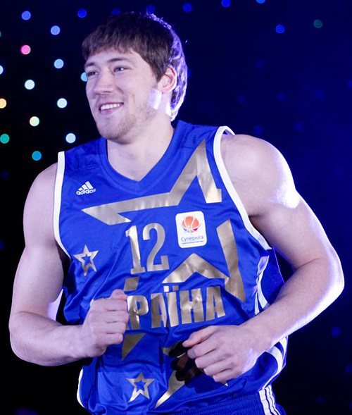 Матч всех звезд баскетбольной Суперлиги 2012. Киев.